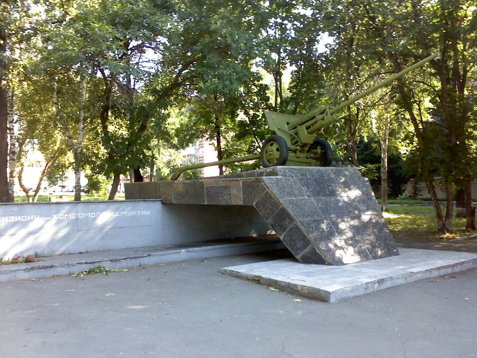 Памятник артиллерийскому дивизиону Комсомола Удмуртии